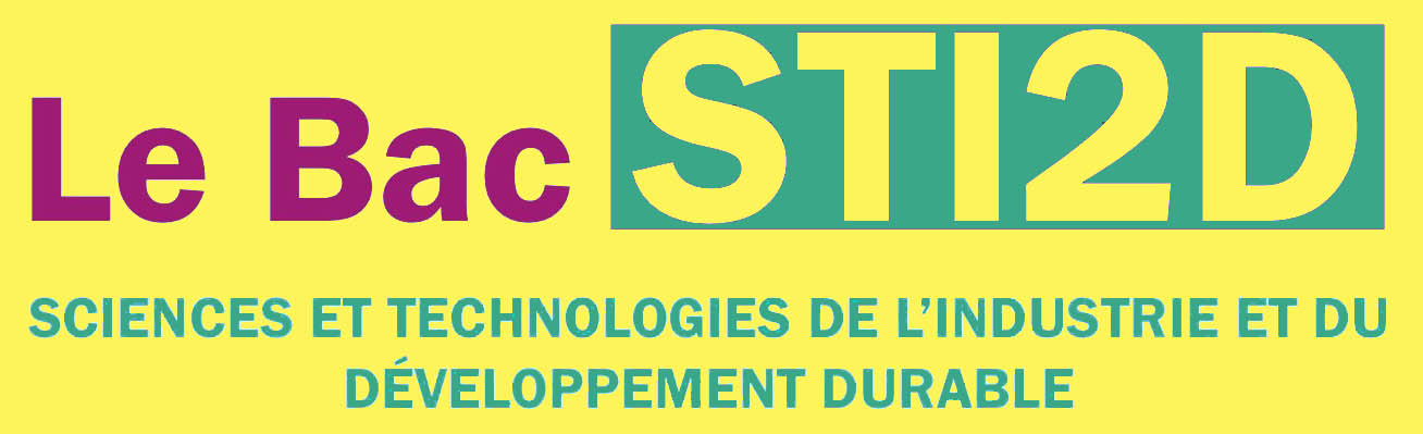 Logo du Baccalauréat français Sciences et Techniques de l'Industrie et du Développement durable.